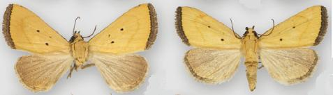 Marimatha quadrata male (right) female (left)